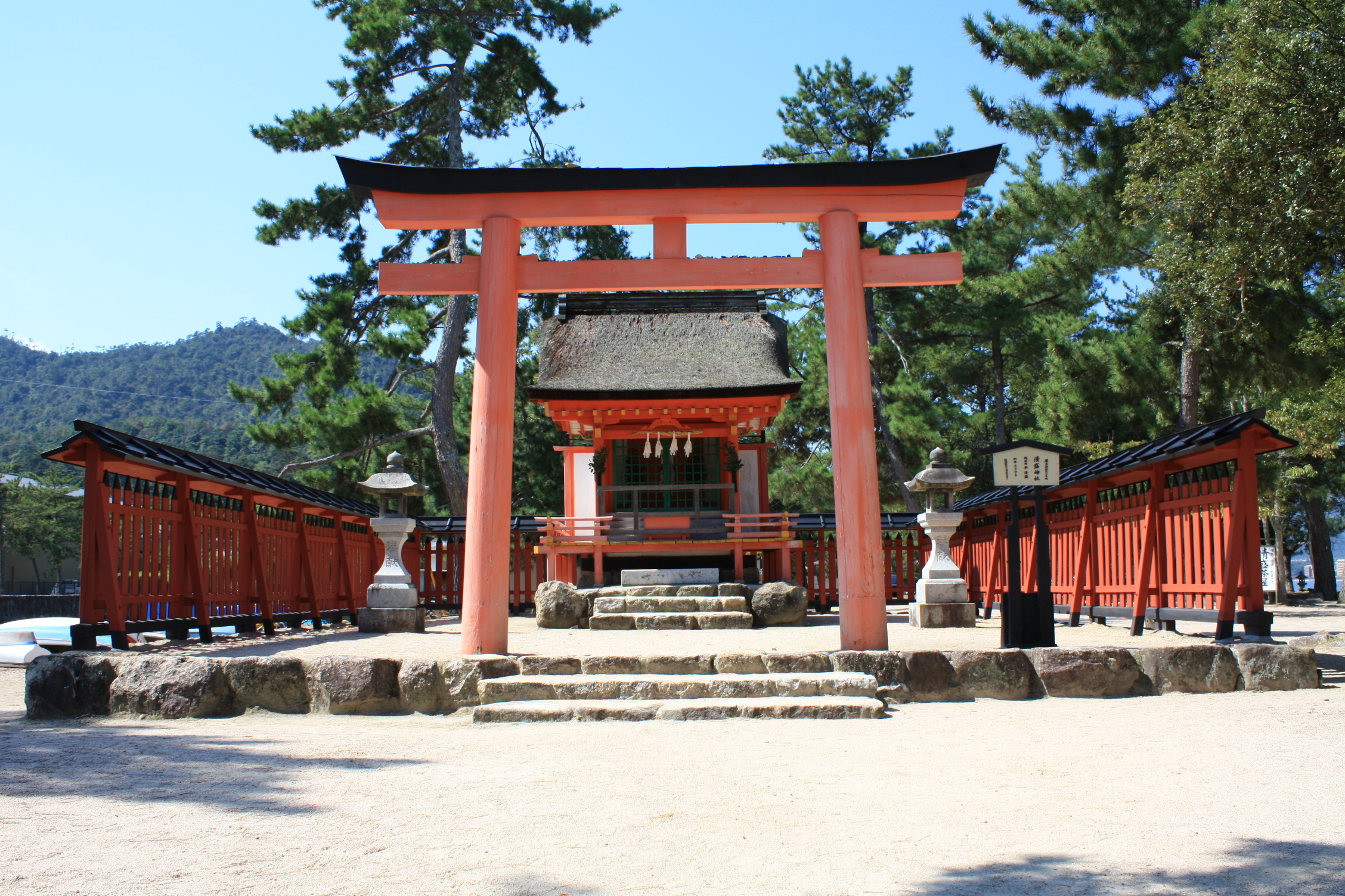 平清盛を祭神として祭る神社